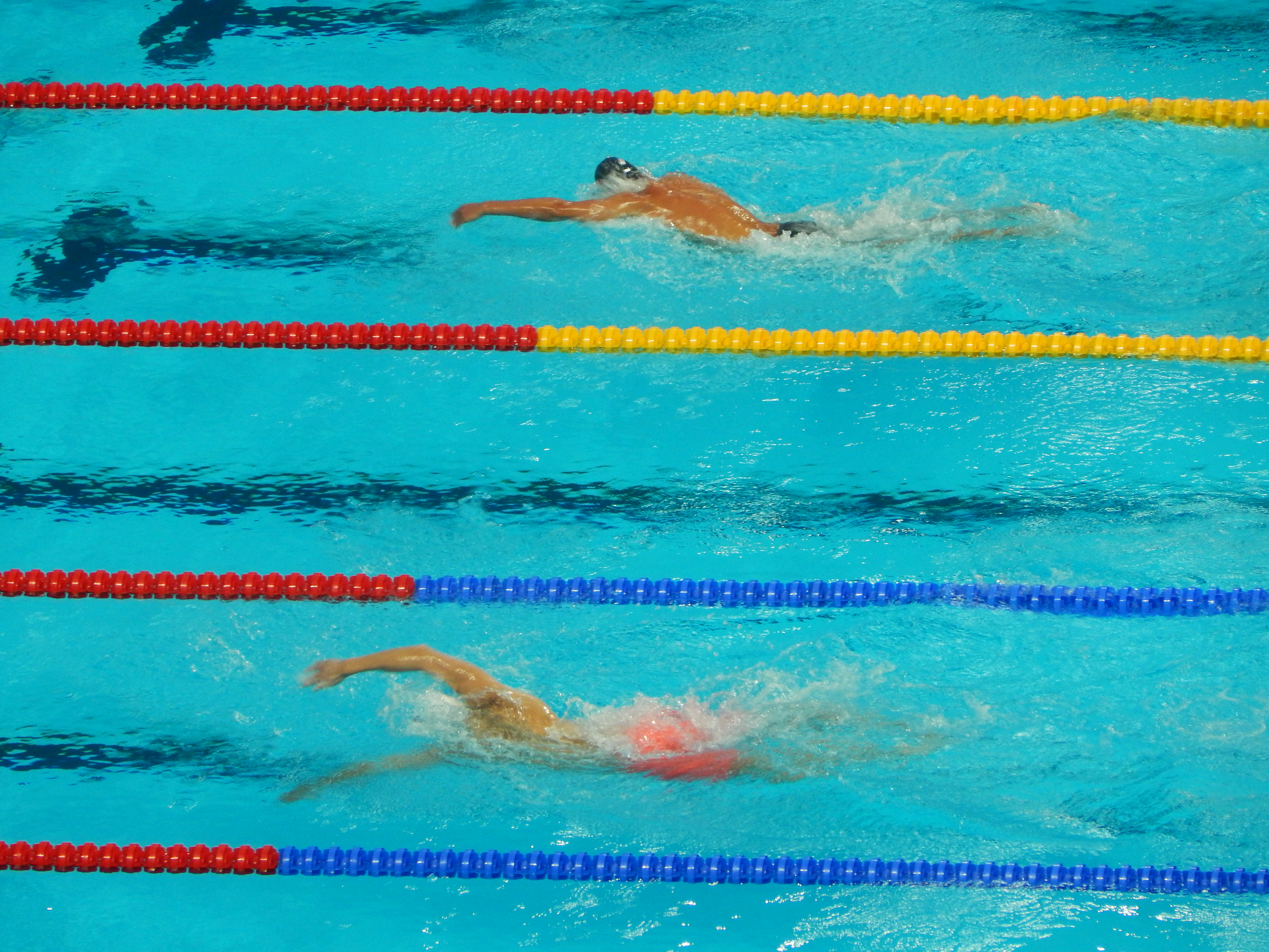 Сунь Ян и Пальтриньери в финальном заплыве на 800 метров в Казани